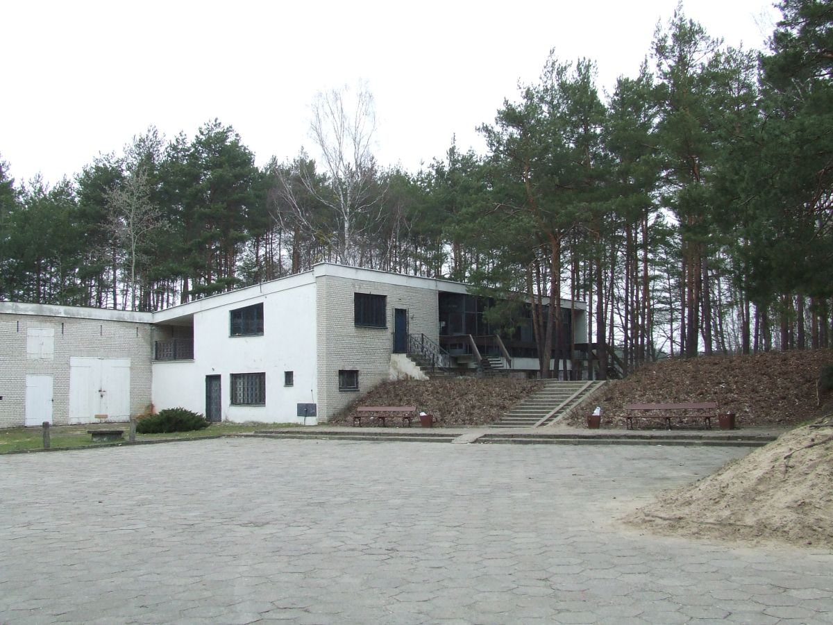 Palmiry, Muzeum walki i Męczeństwa